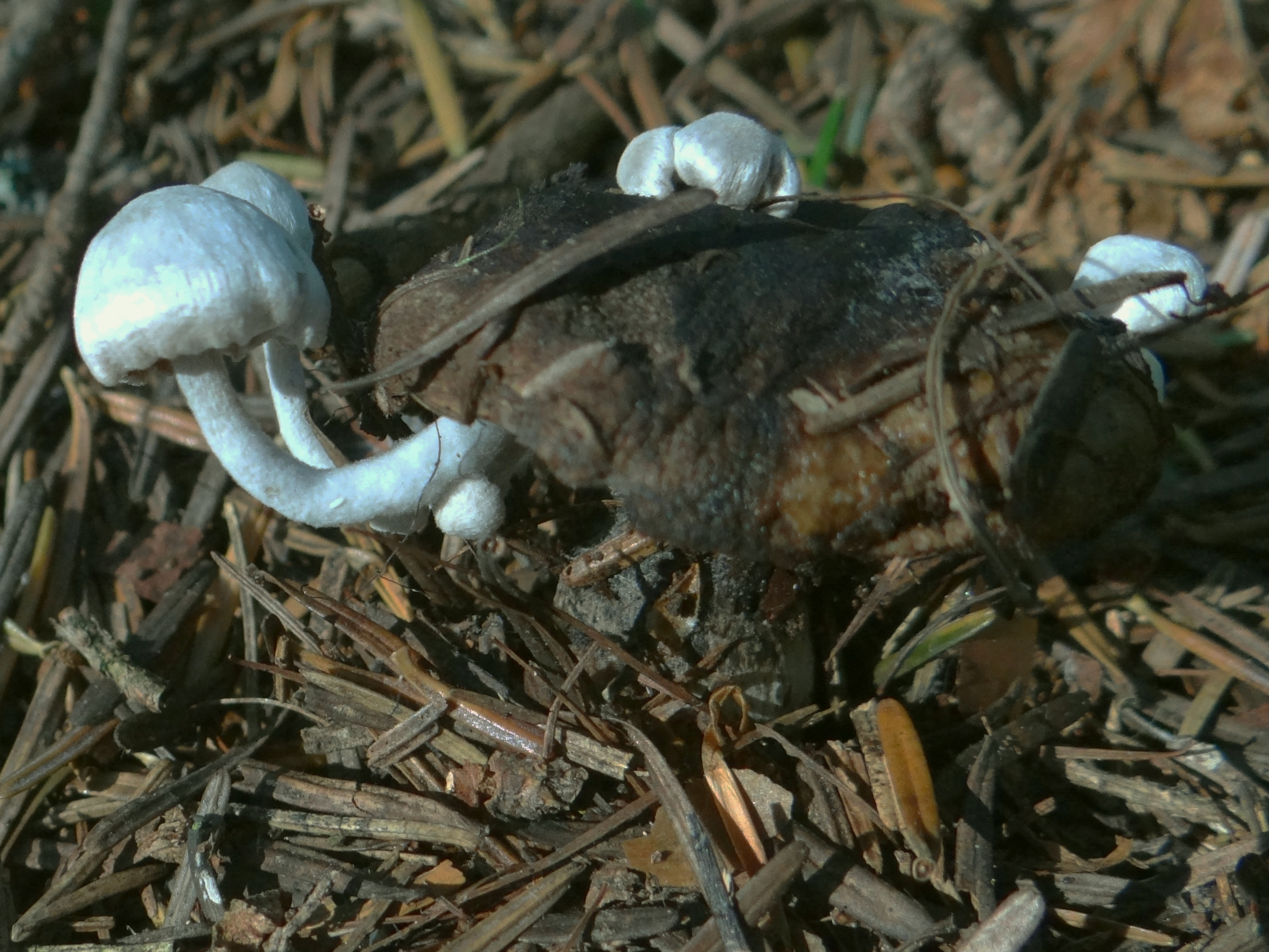 Asterophora parasitica (location:Poland, Kamionna (województwo małopolskie)